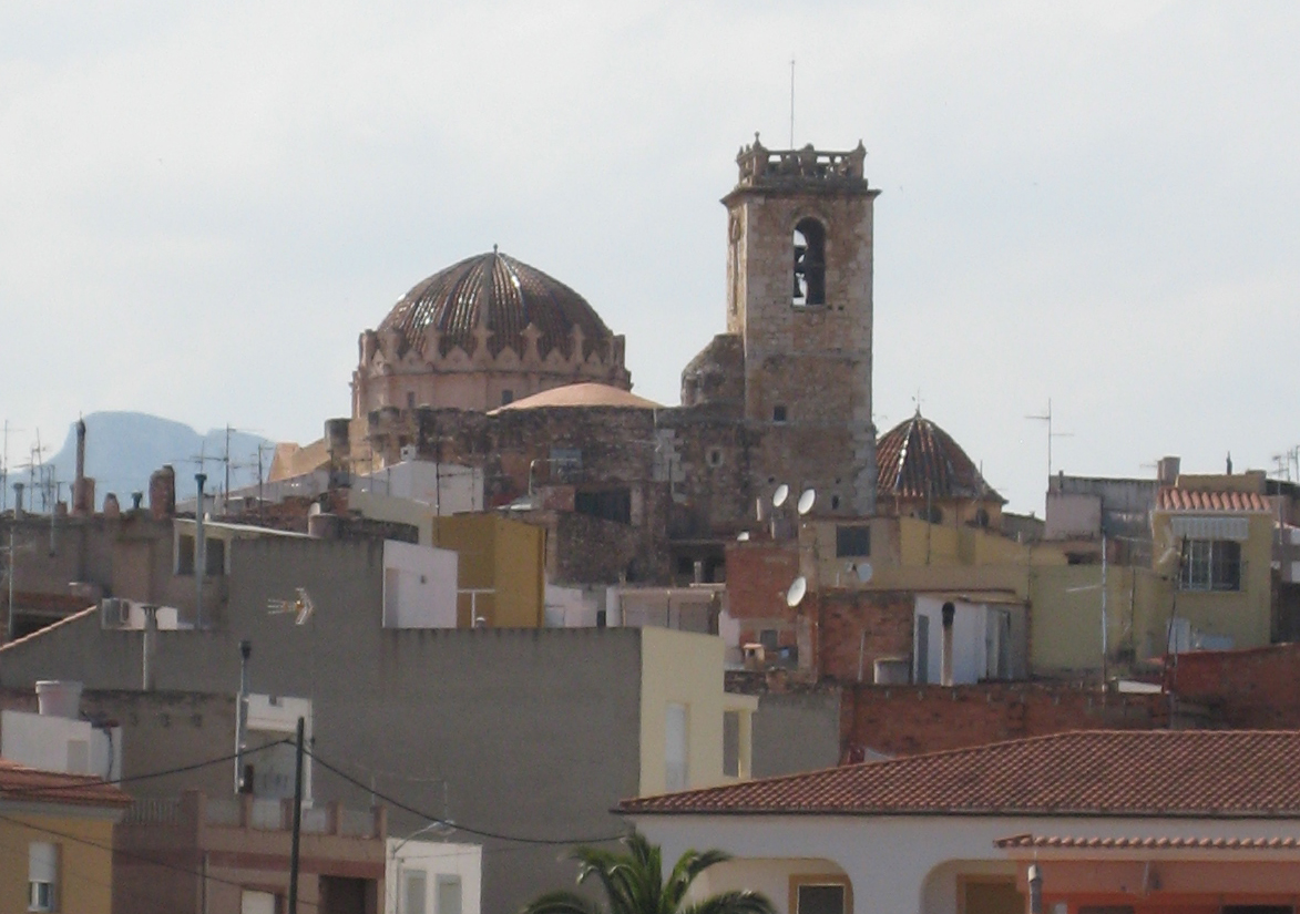 Església de Sant Miquel Arcàngel de Canet lo Roig (Baix Maestrat)